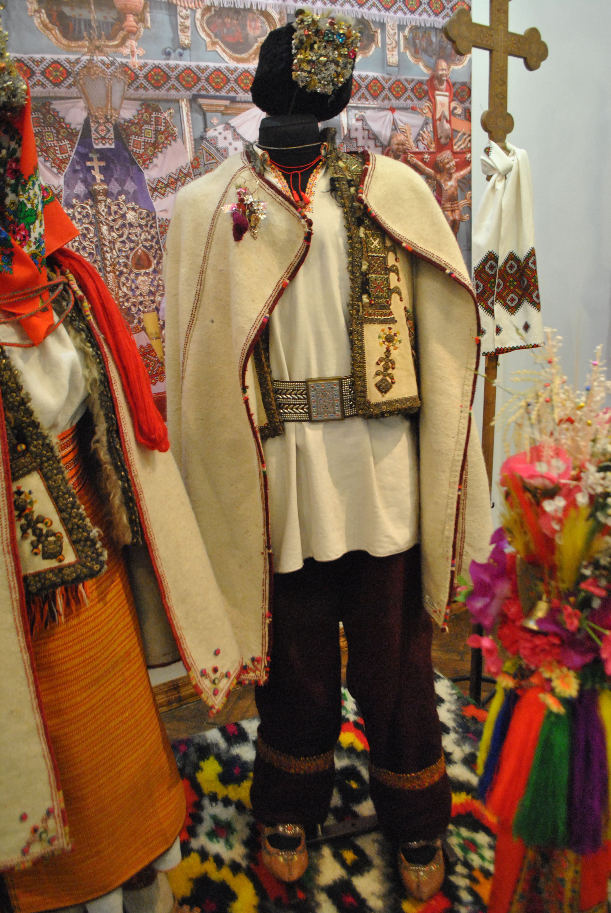 Весільний одяг ХХ століття, с.Космач Косівський район Івано-Франківська область